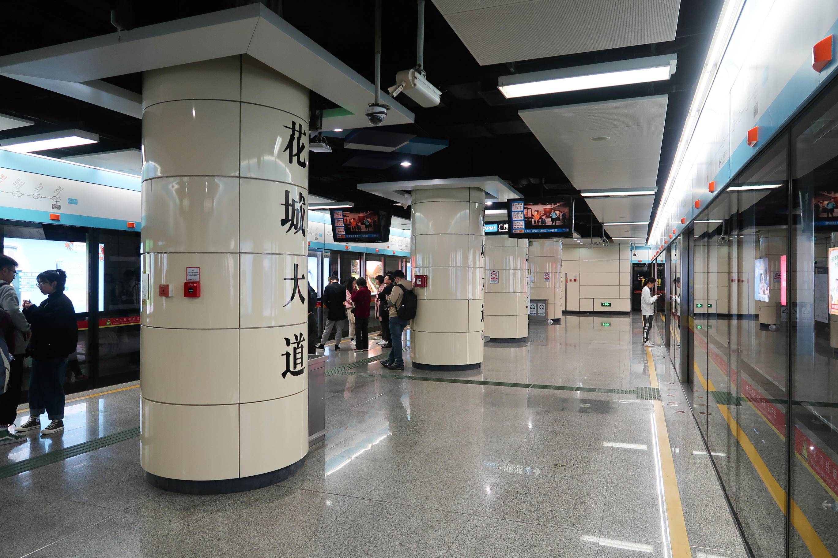 Huacheng Dadao Station